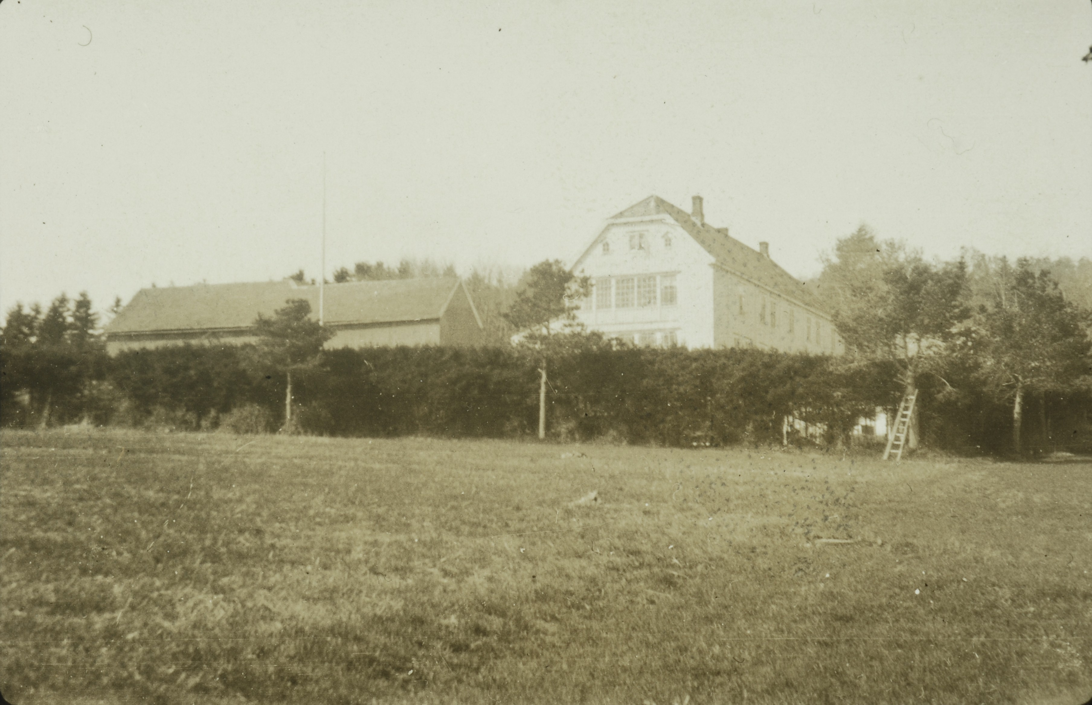 Eldre fotografi av Persaunet gård med omgivelser. Hovedbygningen var et langstrakt hus i 2 etasjer med halvvalmet tak. De siste rester av bebyggelsen på gården ble revet 1970.